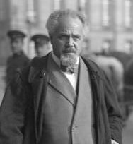 Arthur Crispien, político alemán.